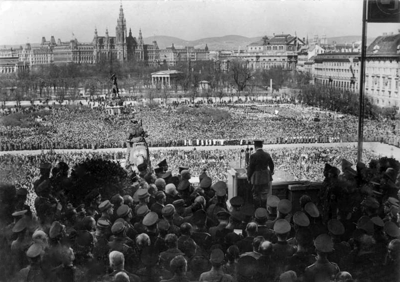 This description has been identified as biased or incorrect: Nazi terminology (in Scherl version, not ADN version)Scherl Bildedienst: Sehnsucht von Geschlechtern fand ihre Erfüllung: Österreich kam wieder heim zum Reich. Am Dienstag, dem 15. März 1938, sprach Adolf Hitler zum ersten Male von der Rampe der Wiener Hofburg zu seinem Volk und zur Welt. Dankbar konnte er die Erfüllung dieser grossen, ihm vom Schicksal auferlegten Aufgabe als vollzogen vor der Geschichte melden. ADN-ZB/Archiv Einmarsch der faschistischen deutschen Wehrmacht in Österreich und Annexion des Landes im März 1938. Ansprache Adolf Hitlers am 15. März 1938 auf dem Helden-Platz in Wien. 35143-38